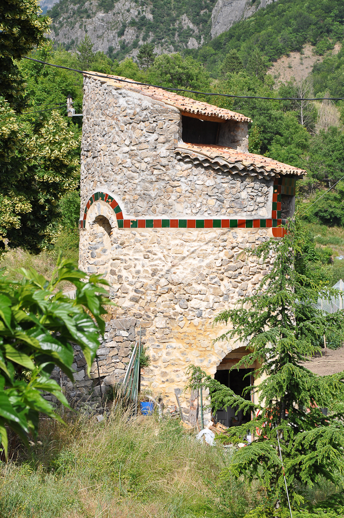 Pigeonnier à Châteaufort